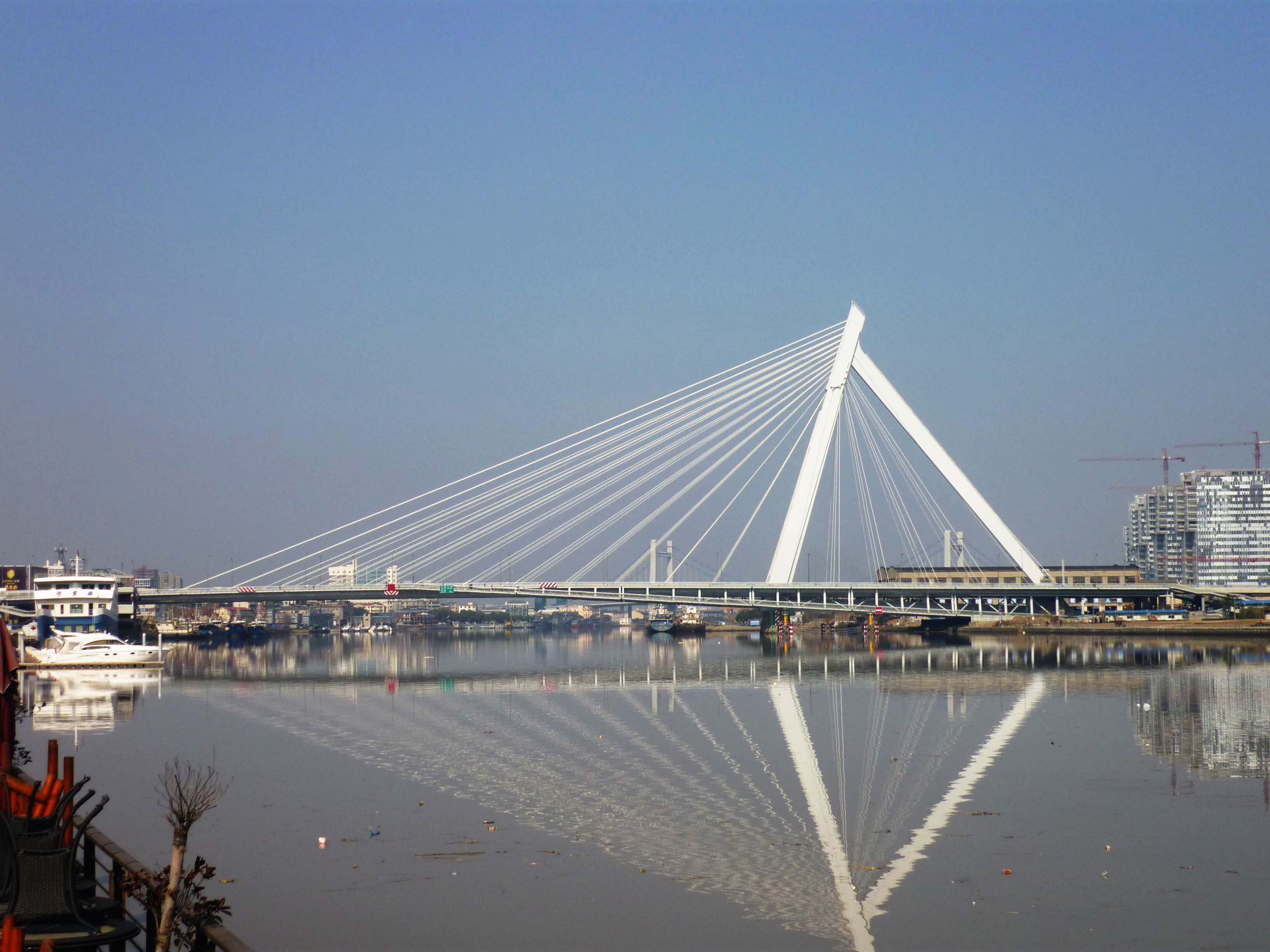 宁波外滩大桥